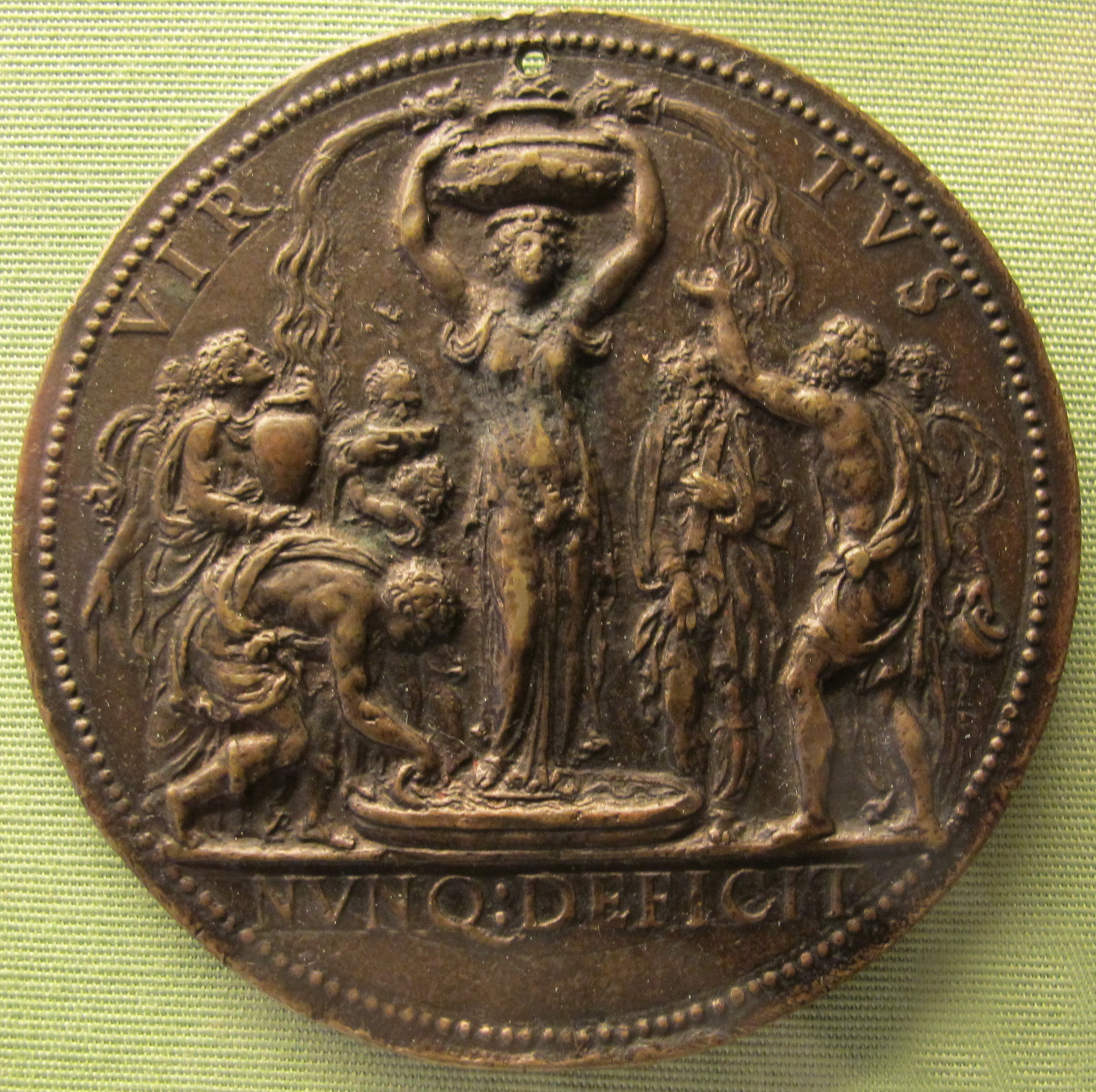 Jacopo da trezzo, med di giannello della torre, v. con allegoria di virtù, 1550 ca